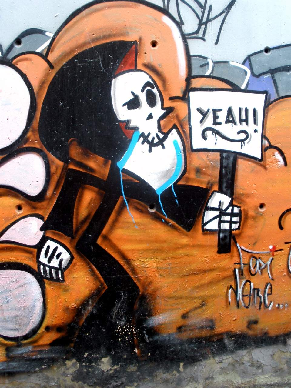 Graffiti in Aretxabaleta (Gipuzkoa, Spain)